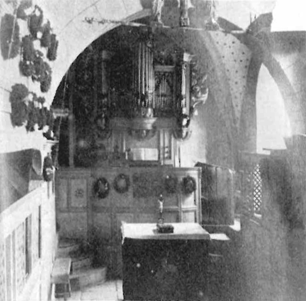 Orgel der Evangelischen Kirche Hausen, Pohlheim, Landkreis Gießen, Hessen, Deutschland